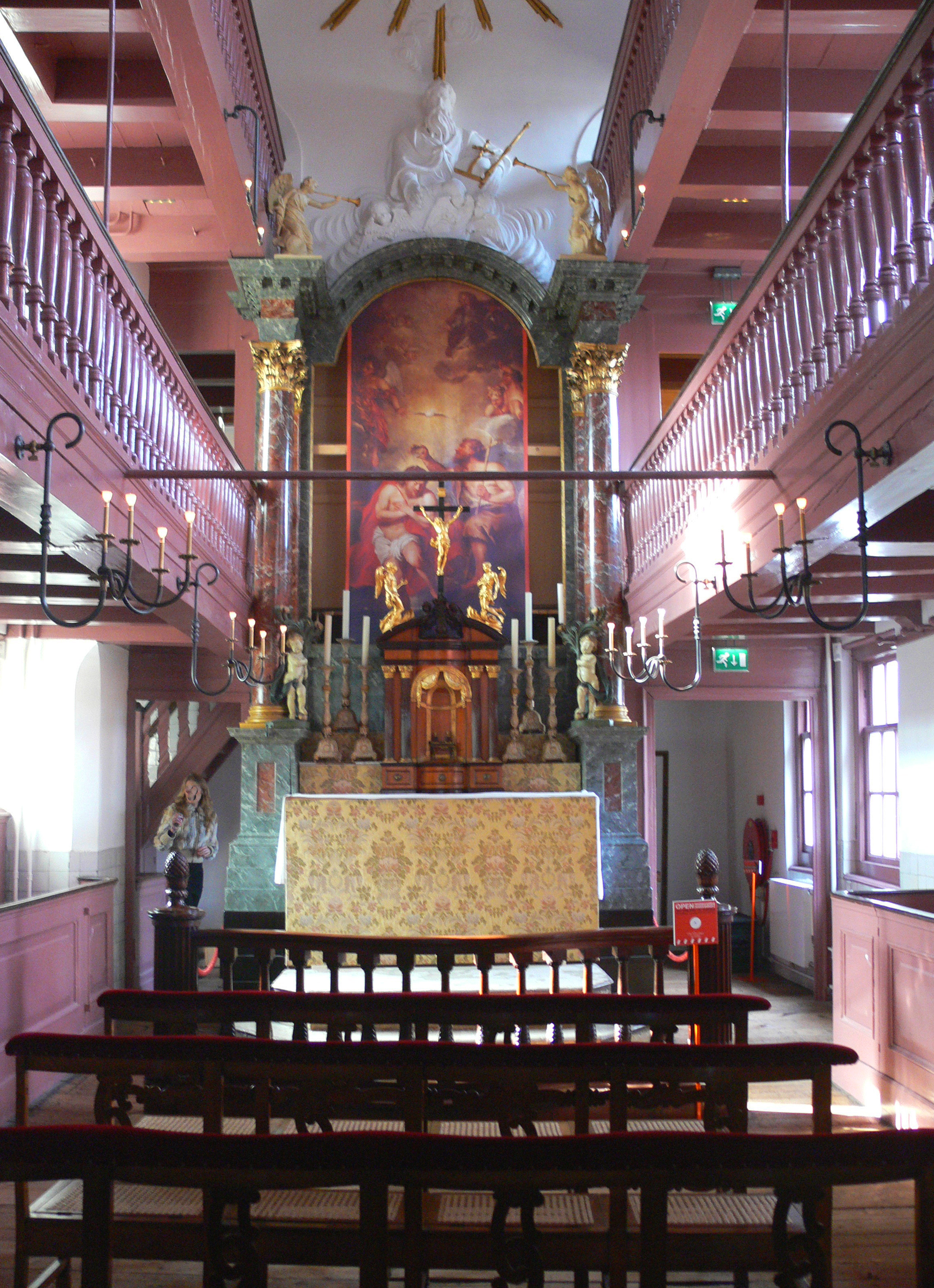 Amsterdam - Museum Ons' Lieve Heer op Solder